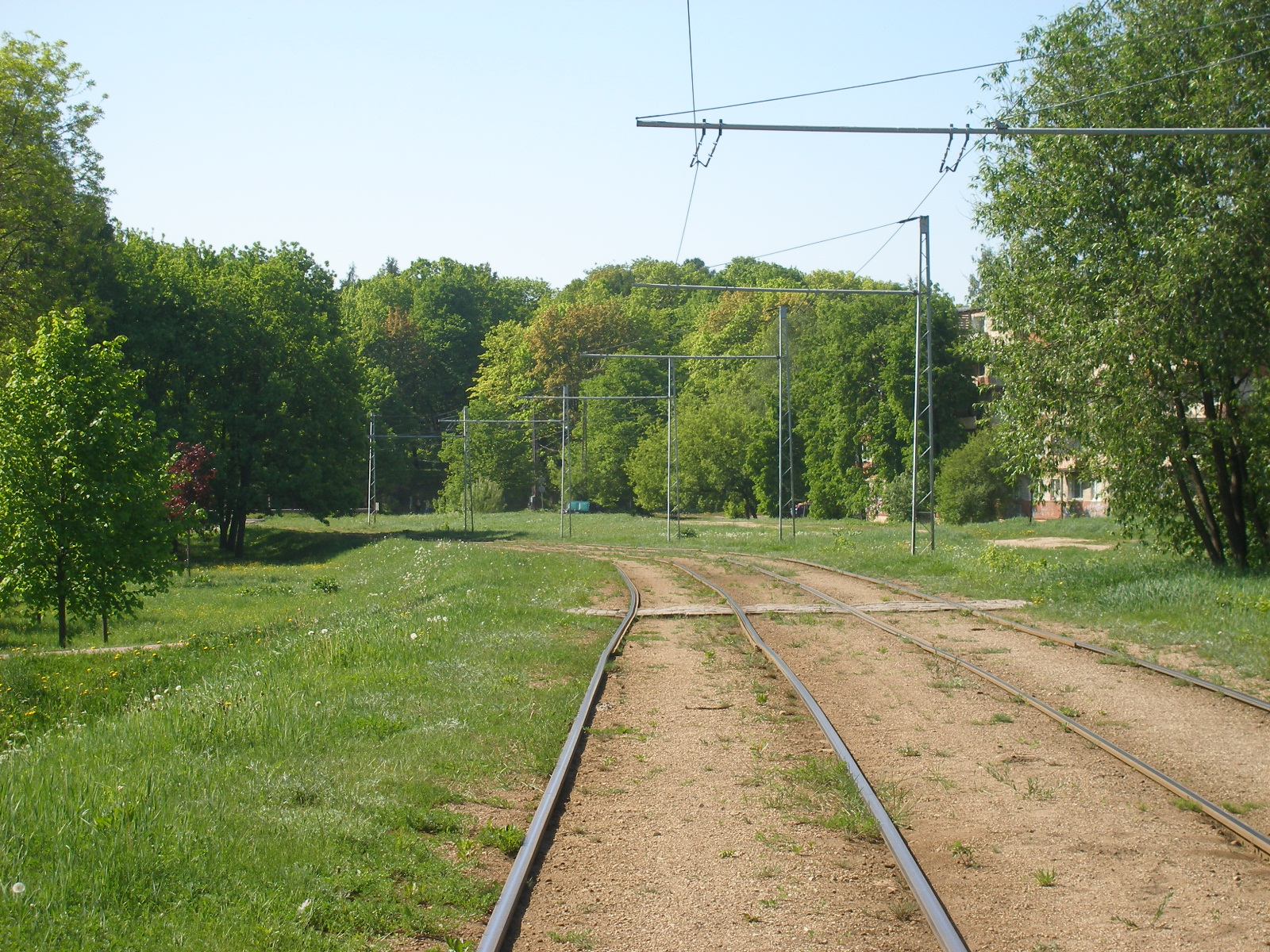 Tramvaja sliedes Aleksandra Grīna bulvārī.